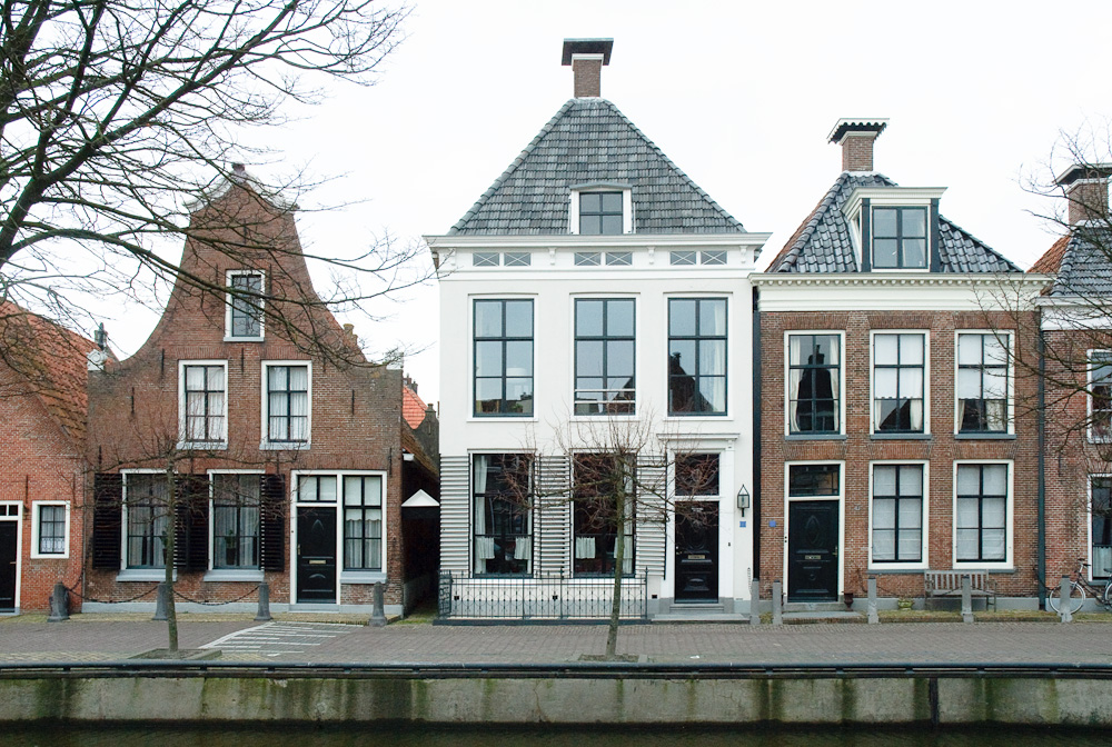 De panden Turfmarkt 3, 5 en 7 in Makkum, Friesland (resp. rm 39394, 39395 en 39396)